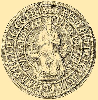 Печать Елизаветы Куманской